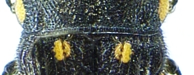 Detail of Acmaeodera degener, missing Scutellum